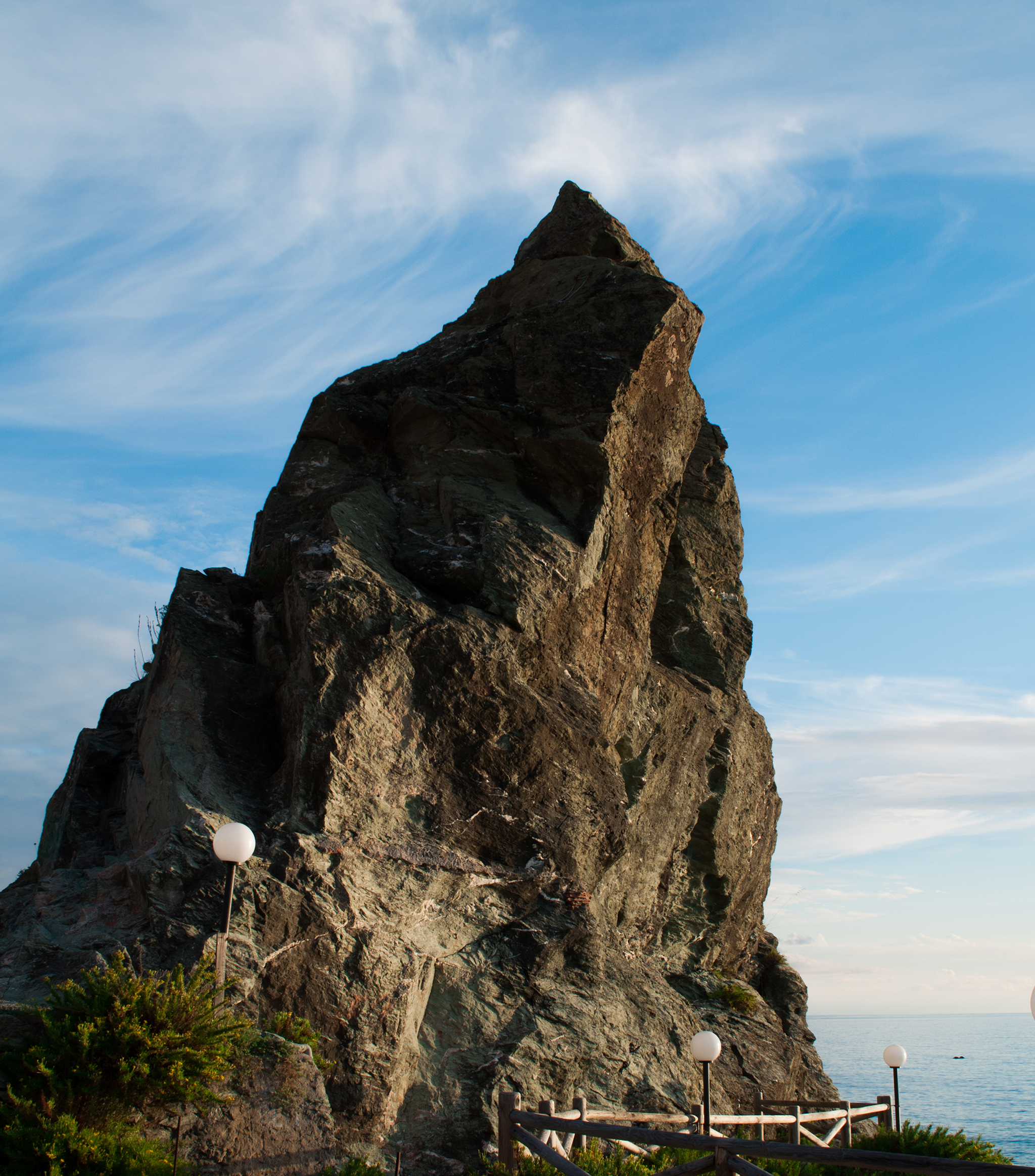 Scoglio di Coreca This is a photo of a monument which is part of cultural heritage of Italy.